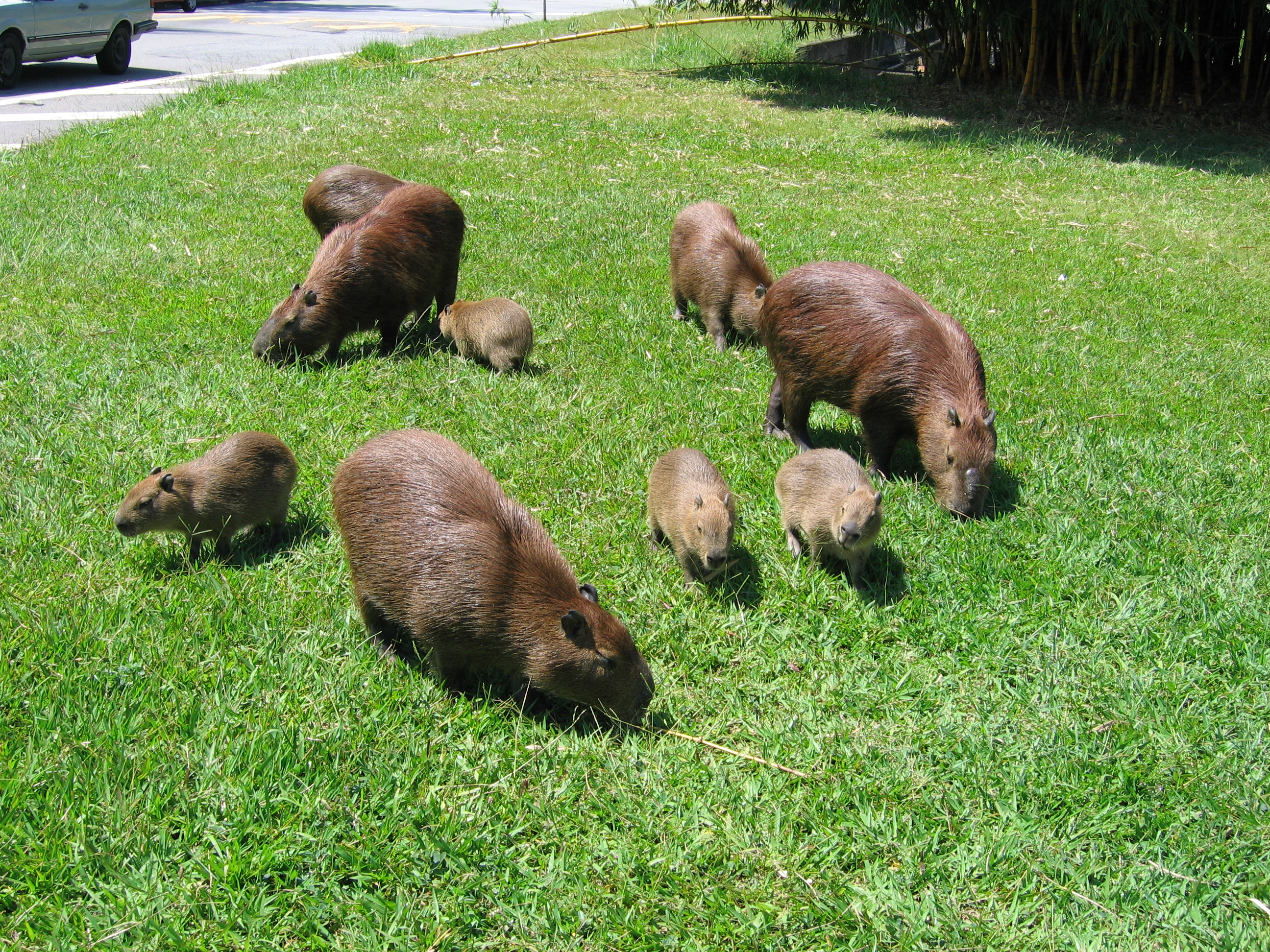 Cinco capivaras adultas acompanhadas de quatro filhotes, alimentando-se de grama na Universidade de São Paulo, junto a raia olímpica